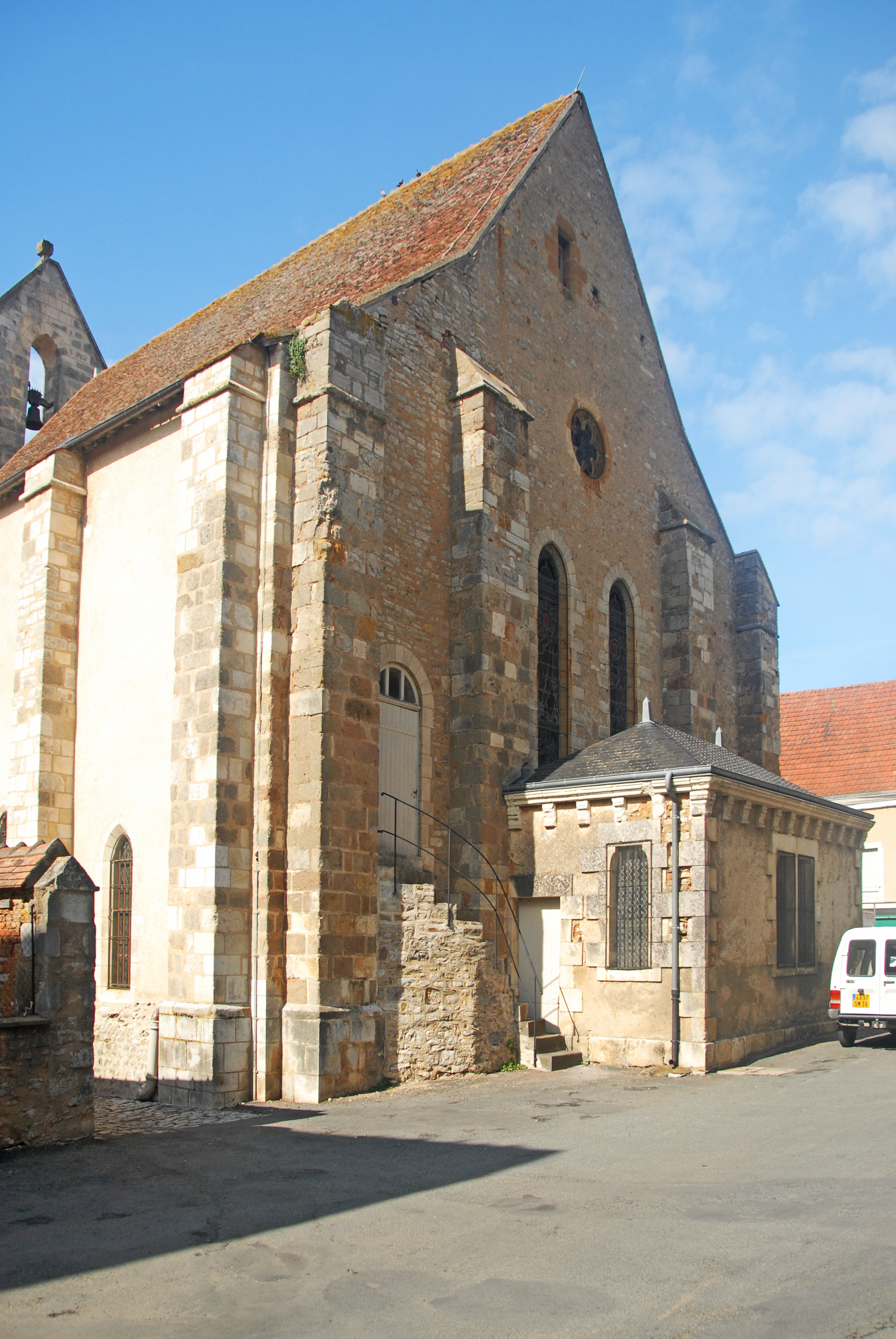 Basilika, Chorwand von S